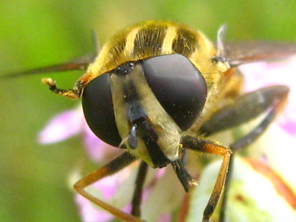 Die Gemeine Sumpfschwebfliege Helophilus pendulus, hier das gesicht einer bereits betäubten Beute der Krabbenspinne Misumena vatia.